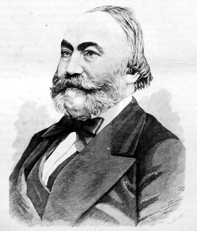 Gorove István (1819–1881) politikus, miniszter, a Magyar Tudományos Akadémia levelező, majd tiszteleti tagja portréja. Pollák Zsigmond metszete